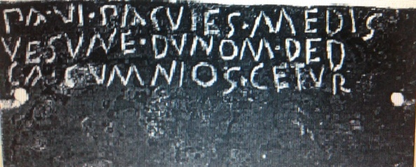 L'iscrizione del bronzo di Antino